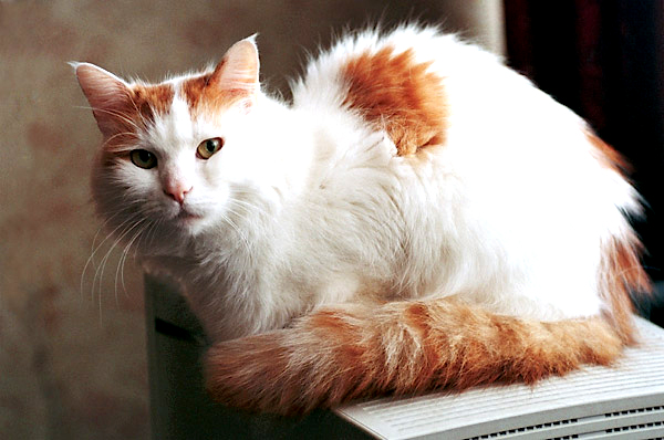 Վանա կատու Արփին (Տերը՝ Կարեն Մանվելյան, Հայաստան)(vancat.masis.am)